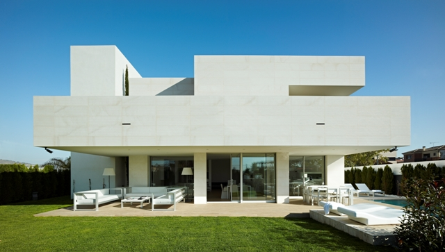 Maison familiale, Vilafranca del Penedès (Barcelona)